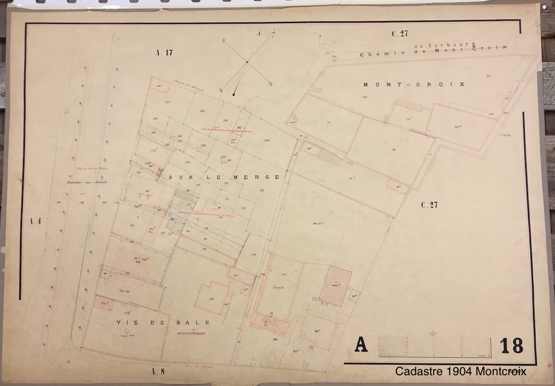 Photographie d'un document d'archive communal, document graphique représentant un ancien cadastre de la ville de Delémont.